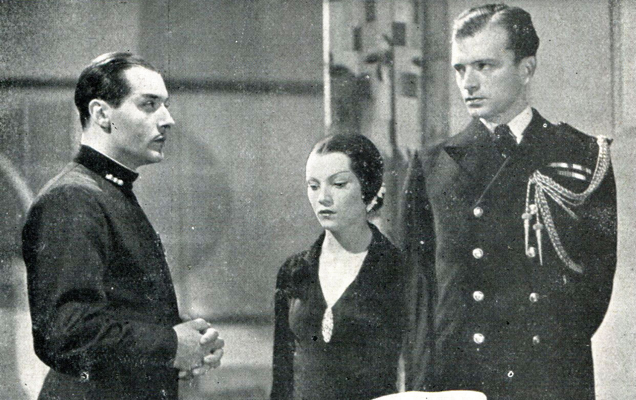 harles Boyer, Annabella e John Loder ne La battaglia (Farkas + Touriansky, 1933)